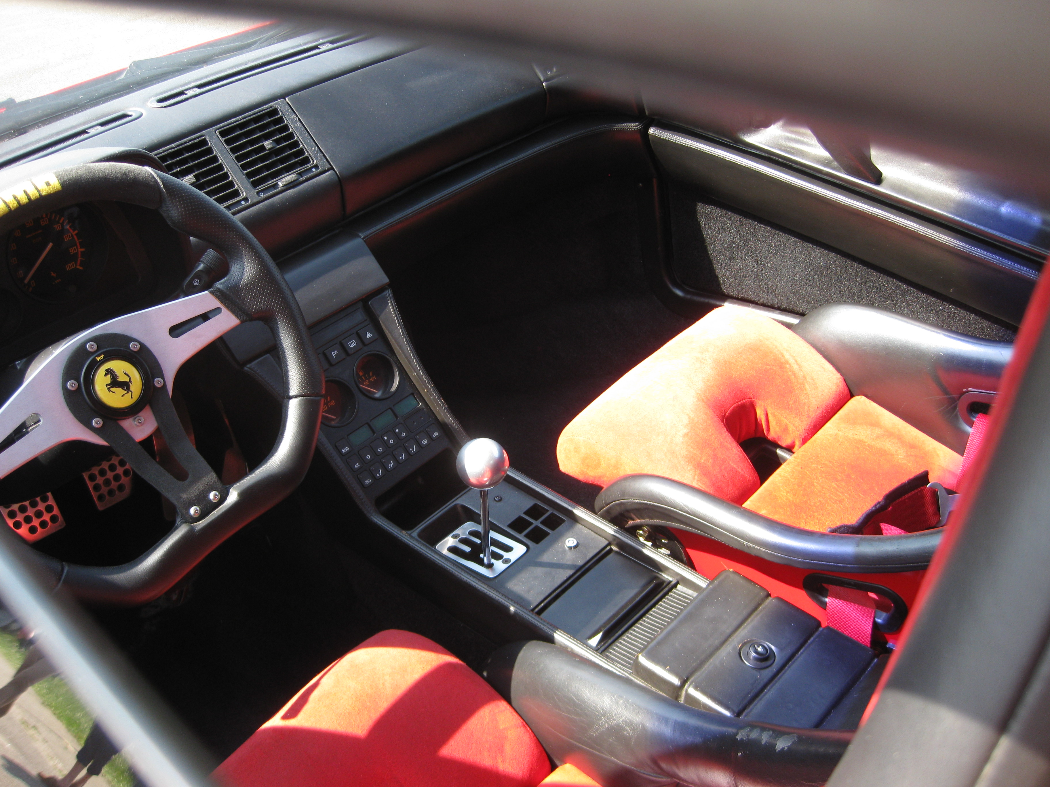 Ferrari 348 tb; Cockpit des 'Challenge'